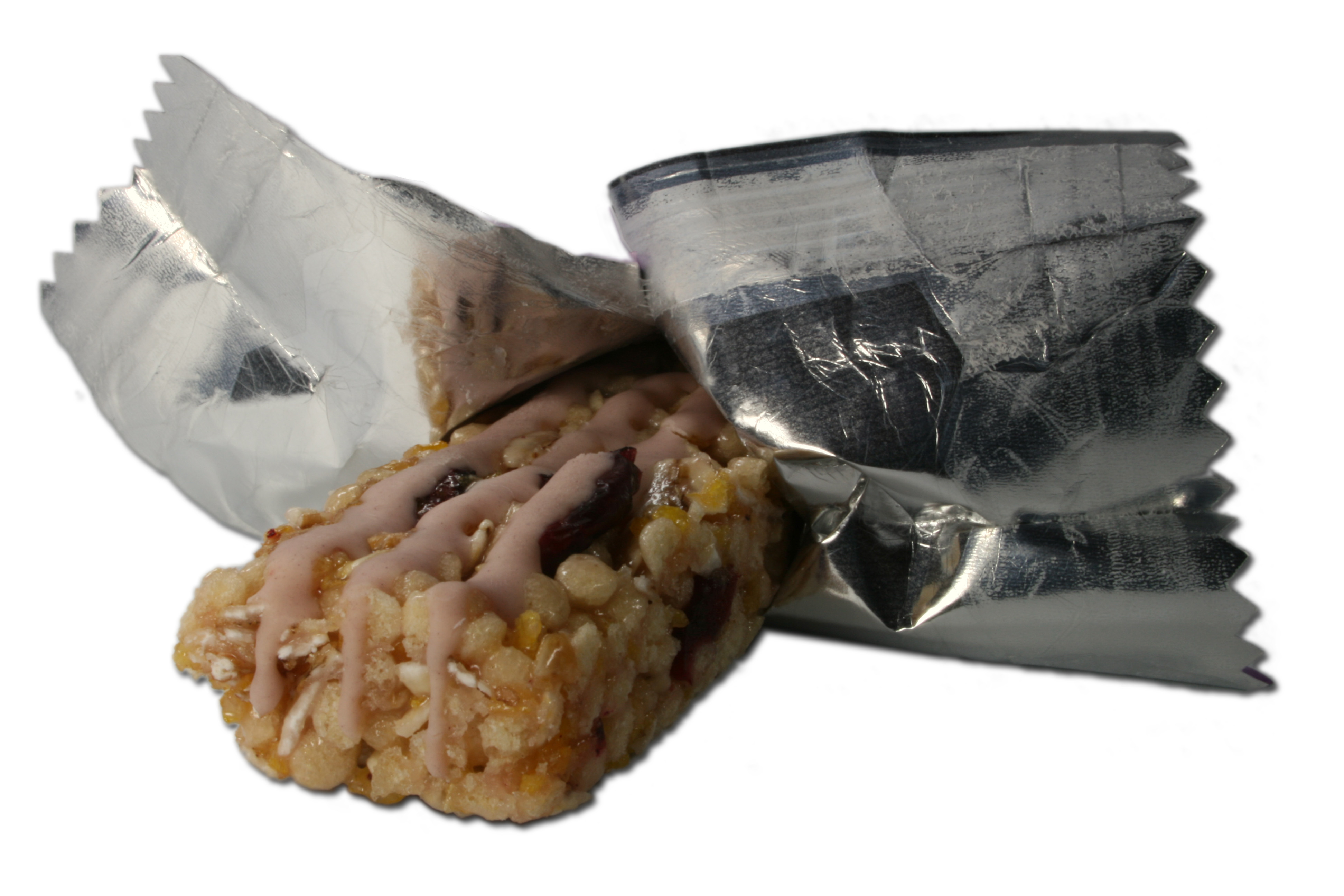 Granola Bar